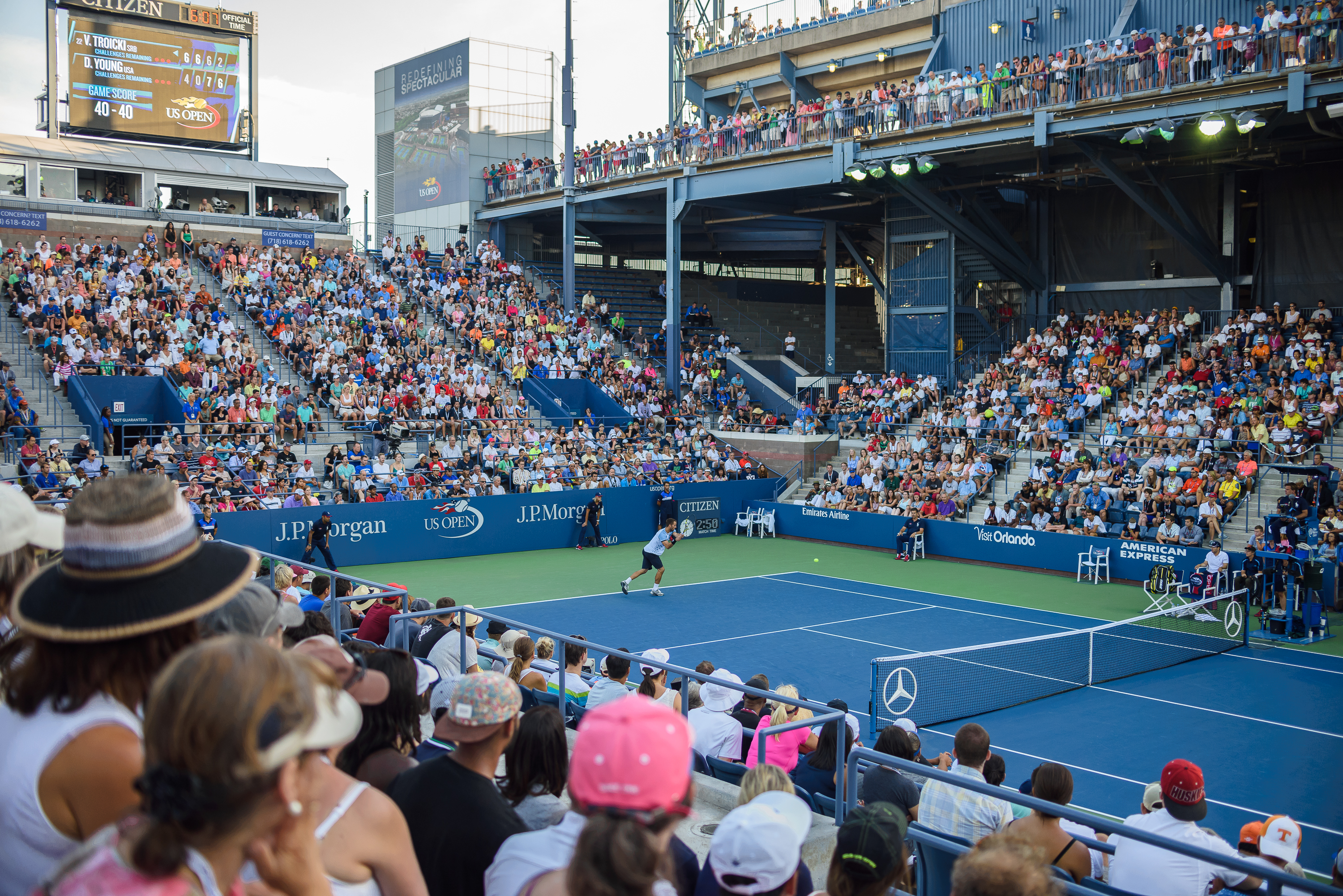 September 5, 2015 Grandstand Flushing, NY